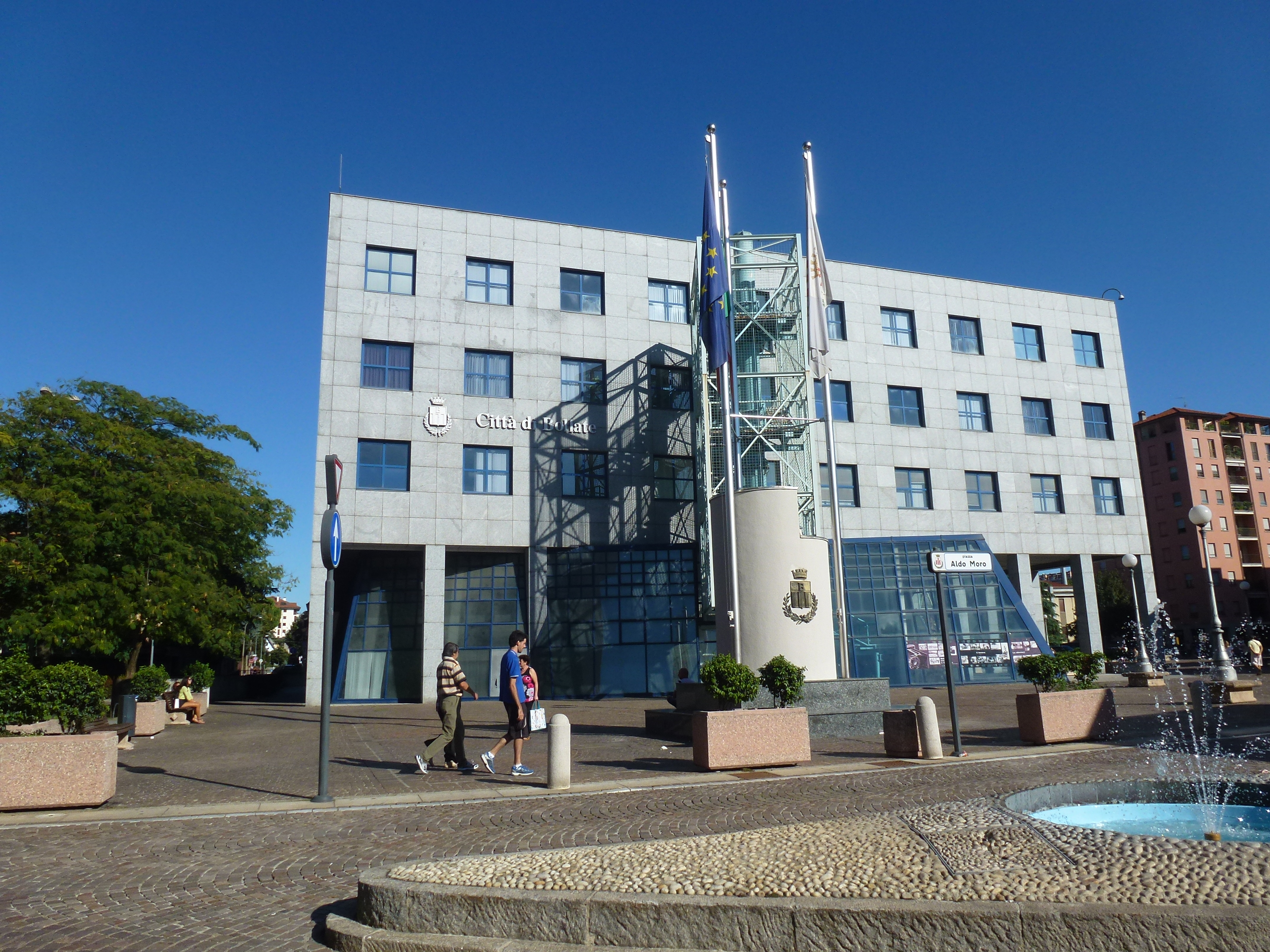 Municipio di Bollate 1989 - 1990 /Andrea Balzani, Virgilio Vercelloni This is a photo of a monument which is part of cultural heritage of Italy.